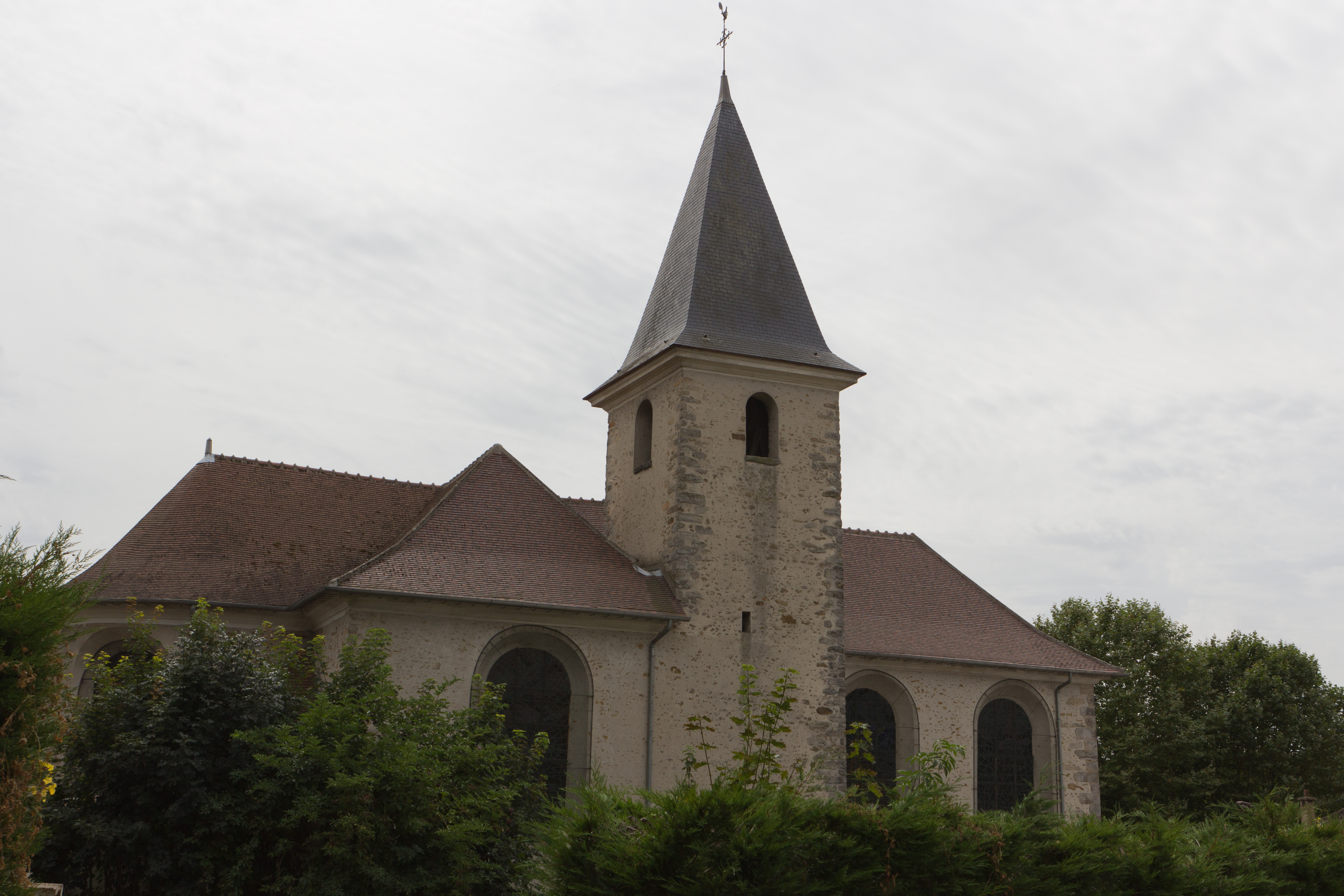 L'église de Fleury-Mérogis, commune de Fleury-Mérogis, département de l'Essonne. France.